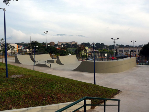 Pista de skate da Praça Granito, situada no bairro carioca do Parque Anchieta, em 2015.